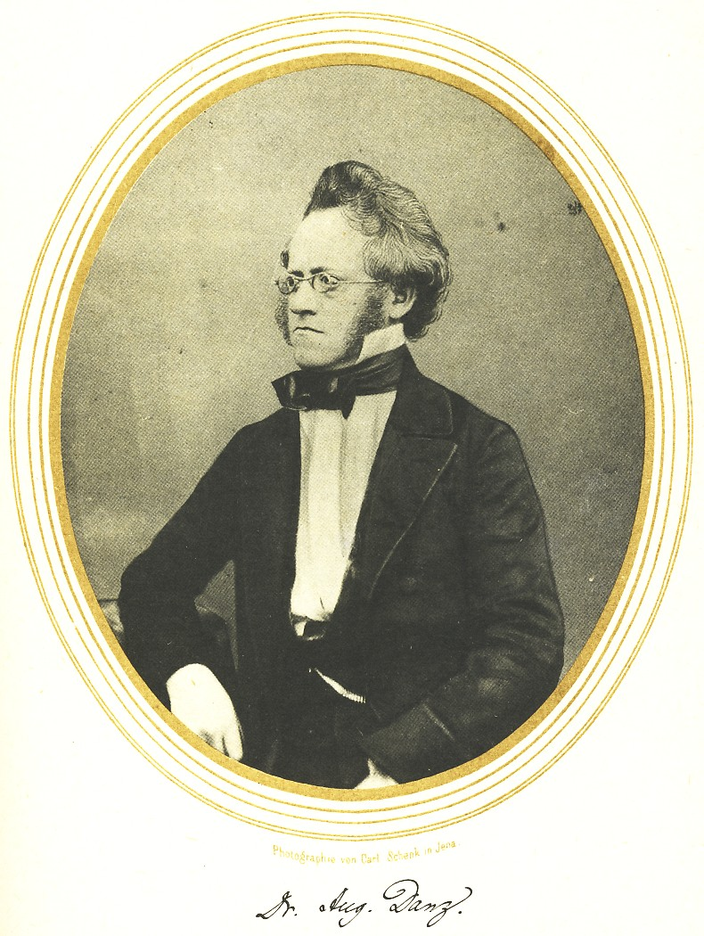 Porträt des Juristen Heinrich Emil August Danz (1806-1881); Fotografie von Carl Schenk (1813–1874)